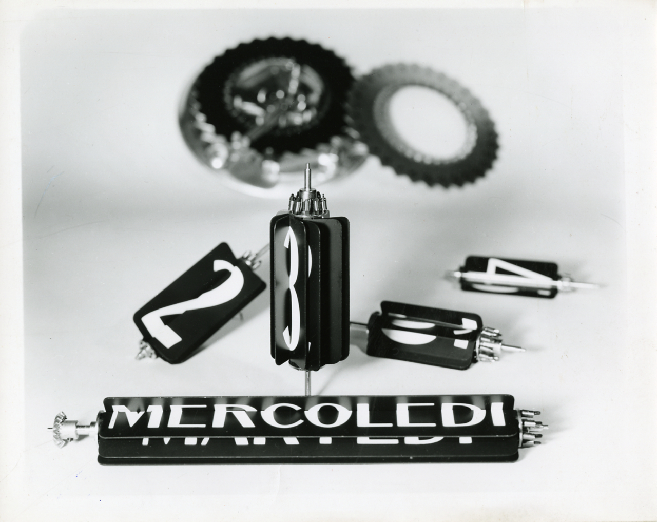 Servizio fotografico : Italia, 1965 / Paolo Monti. - Stampe: 3 : Positivo b/n, gelatina bromuro d'argento/ carta, 24x30. - ((Al verso delle stampe timbro a inchiostro con copyright (Via Colonna - Milano). - Sul coperchio della scatola iscrizione didascalica manoscritta a pennarello nero: "Codussi (Arch.) 1".